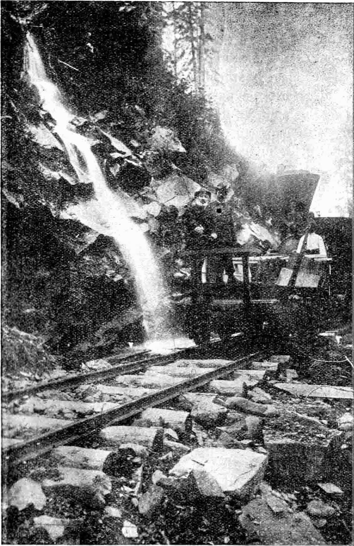 Calea ferată forestieră de pe valea Aţei (afluent al Tarcăului)